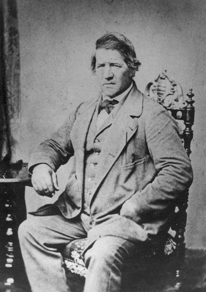 Vater Anton Merz, 1850